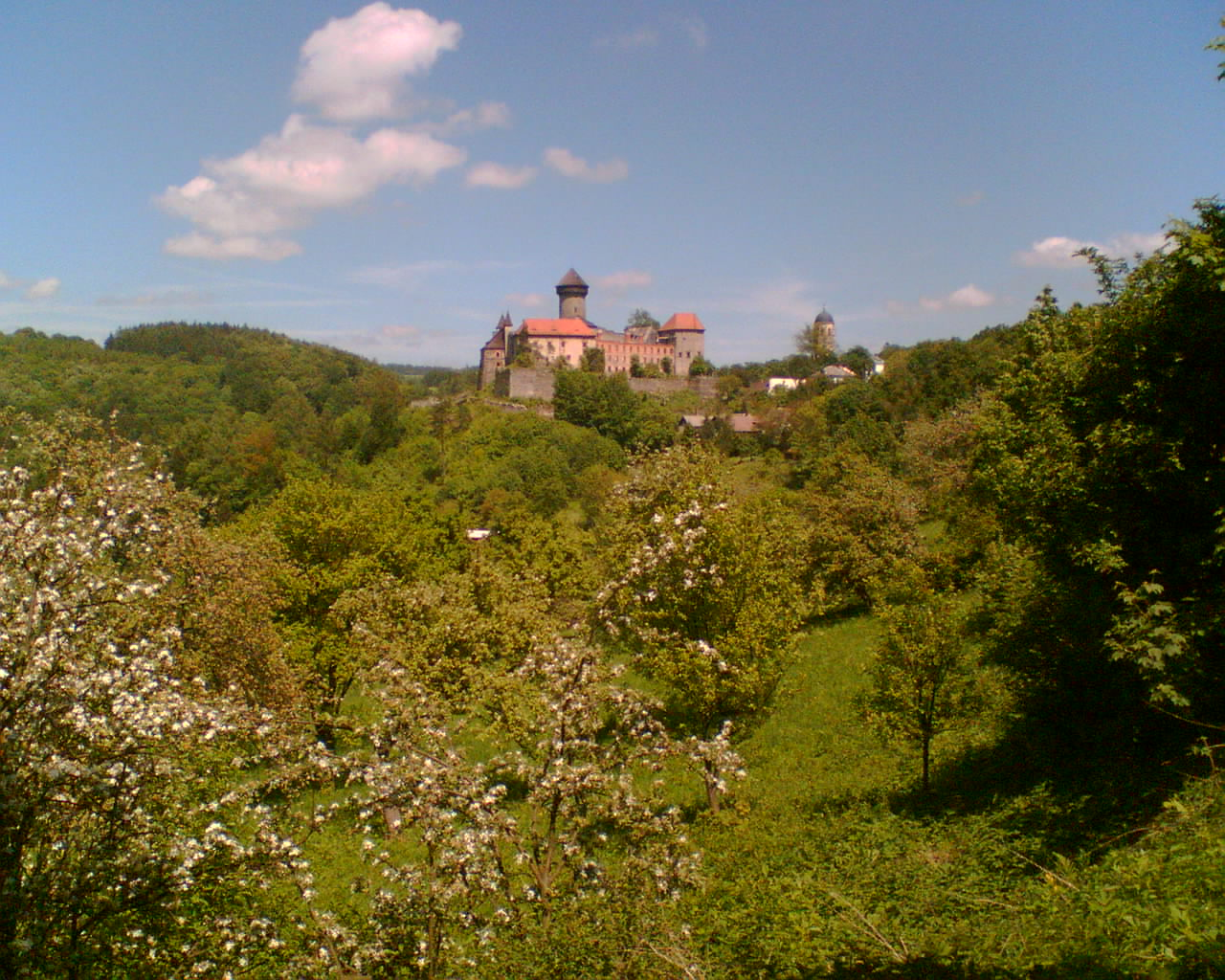 Hrad Sovinec-pohled od jihu